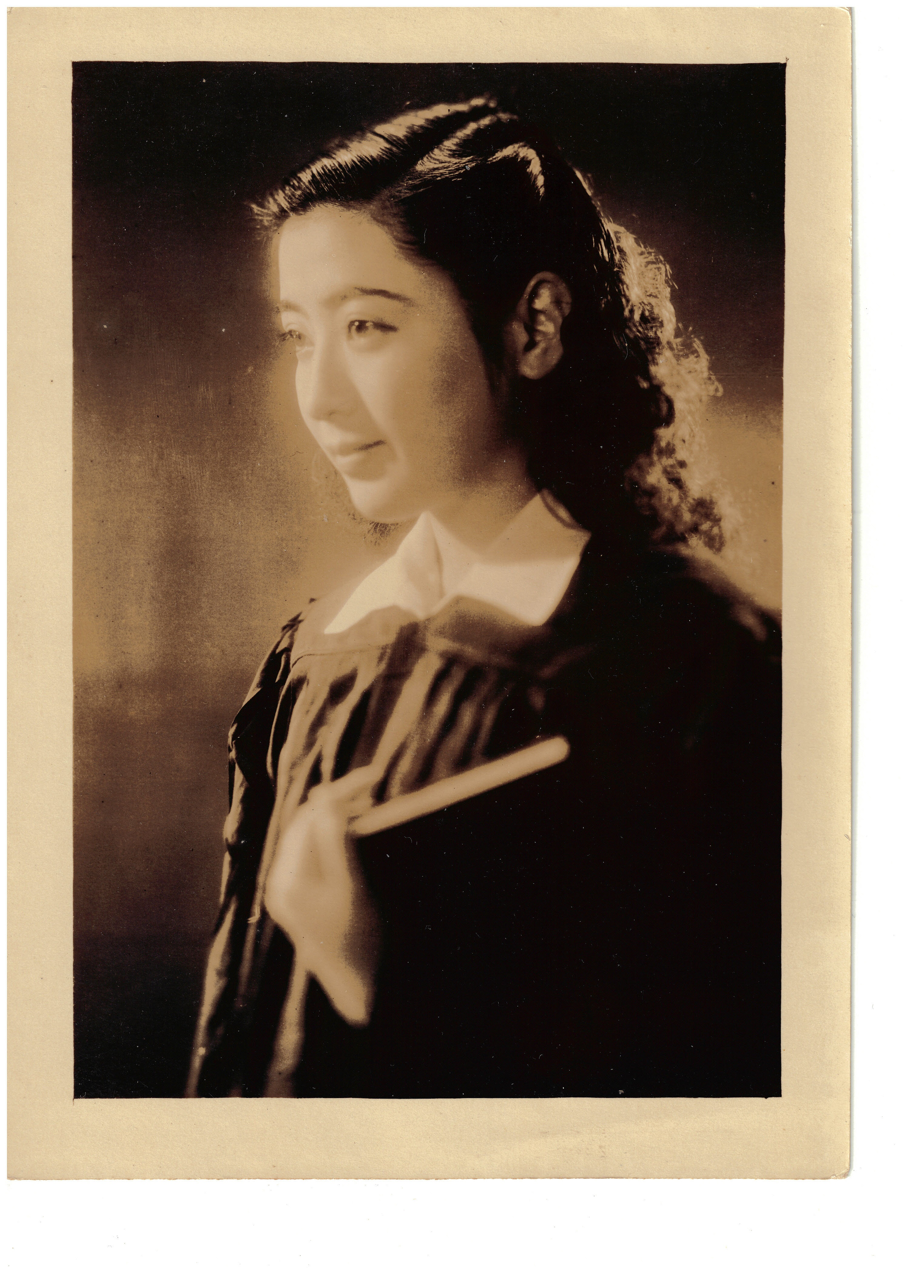 地獄の顔(1947年)